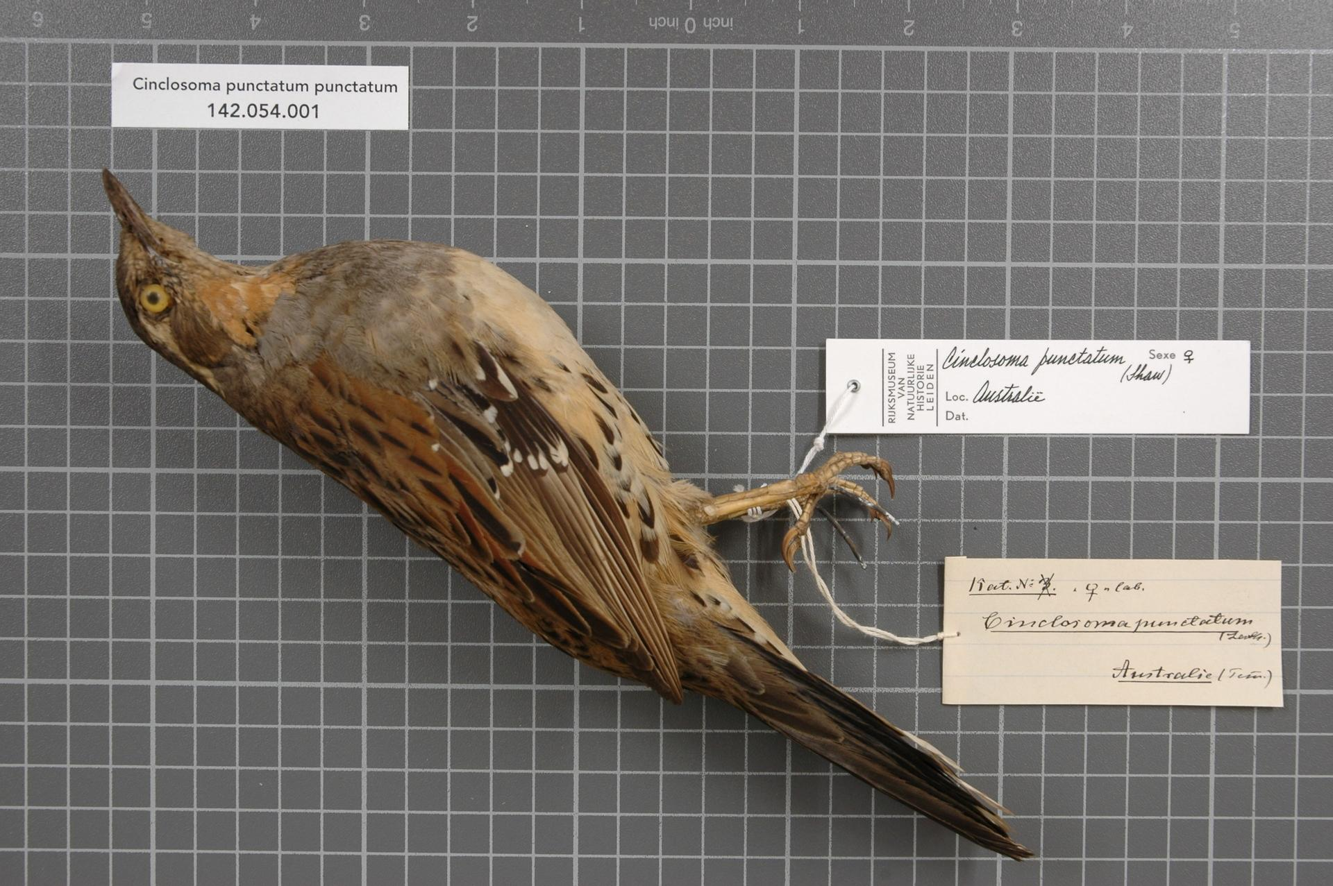 Cinclosoma punctatum punctatum (Shaw, 1794)